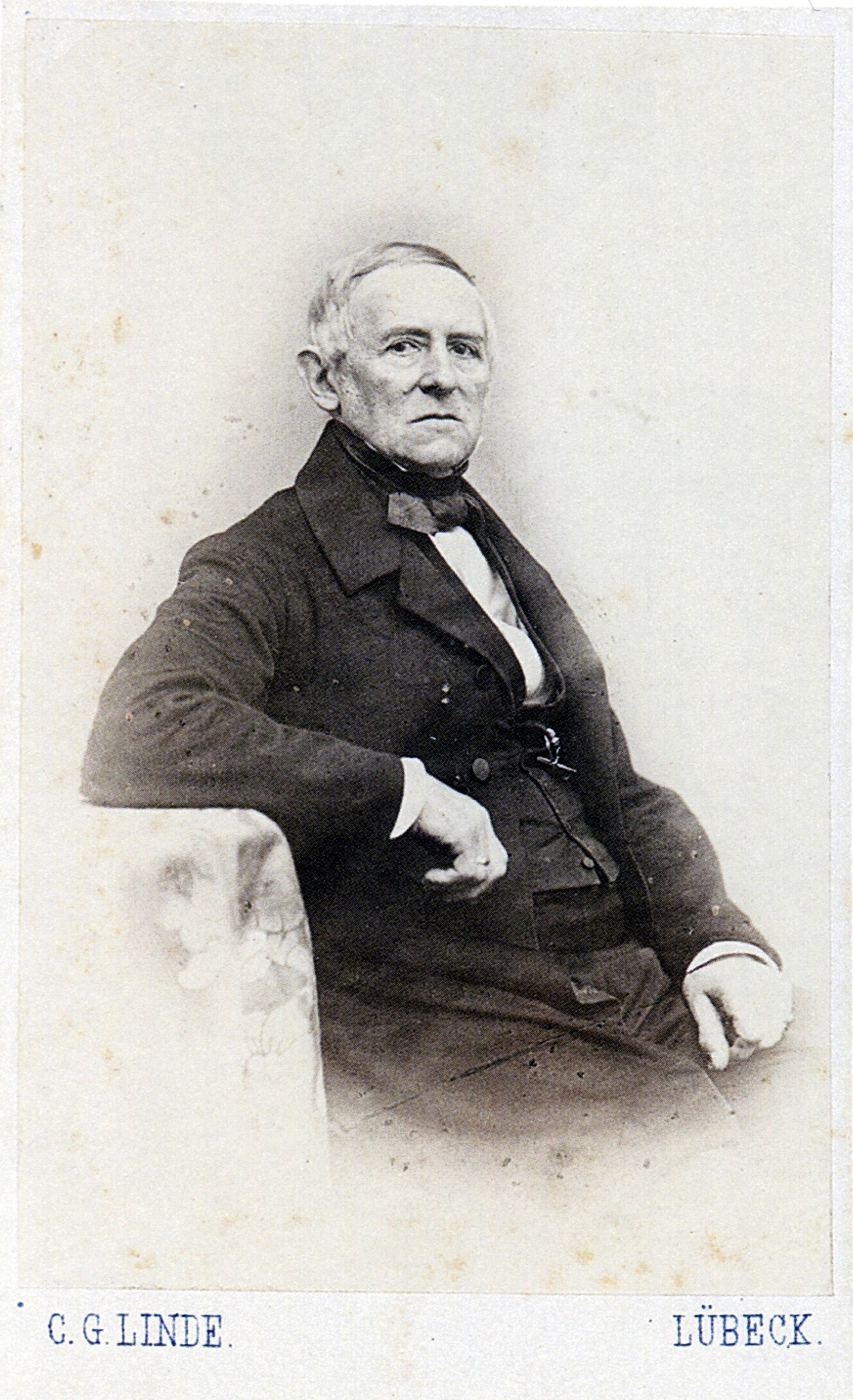 Karl Ludwig Roeck (* 1790; † 29. Januar 1869), Lübecker Bürgermeister. Carte de visite-Photographie, 10,2 x 6,2 cm